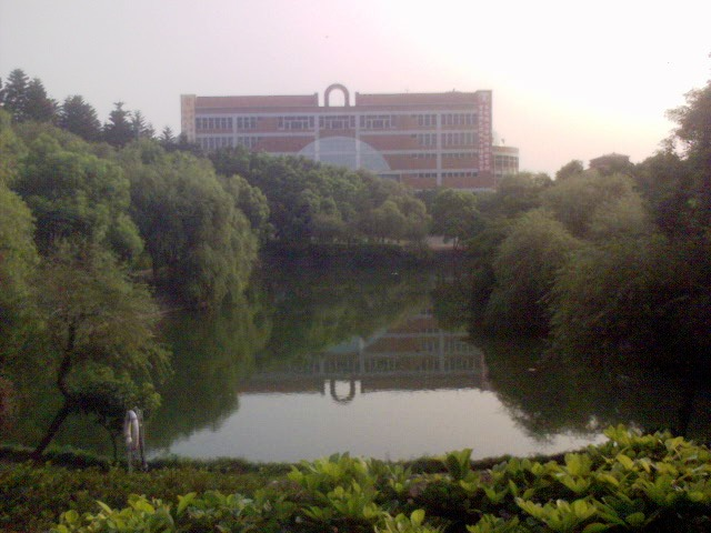 中華大學校園中的白馬湖